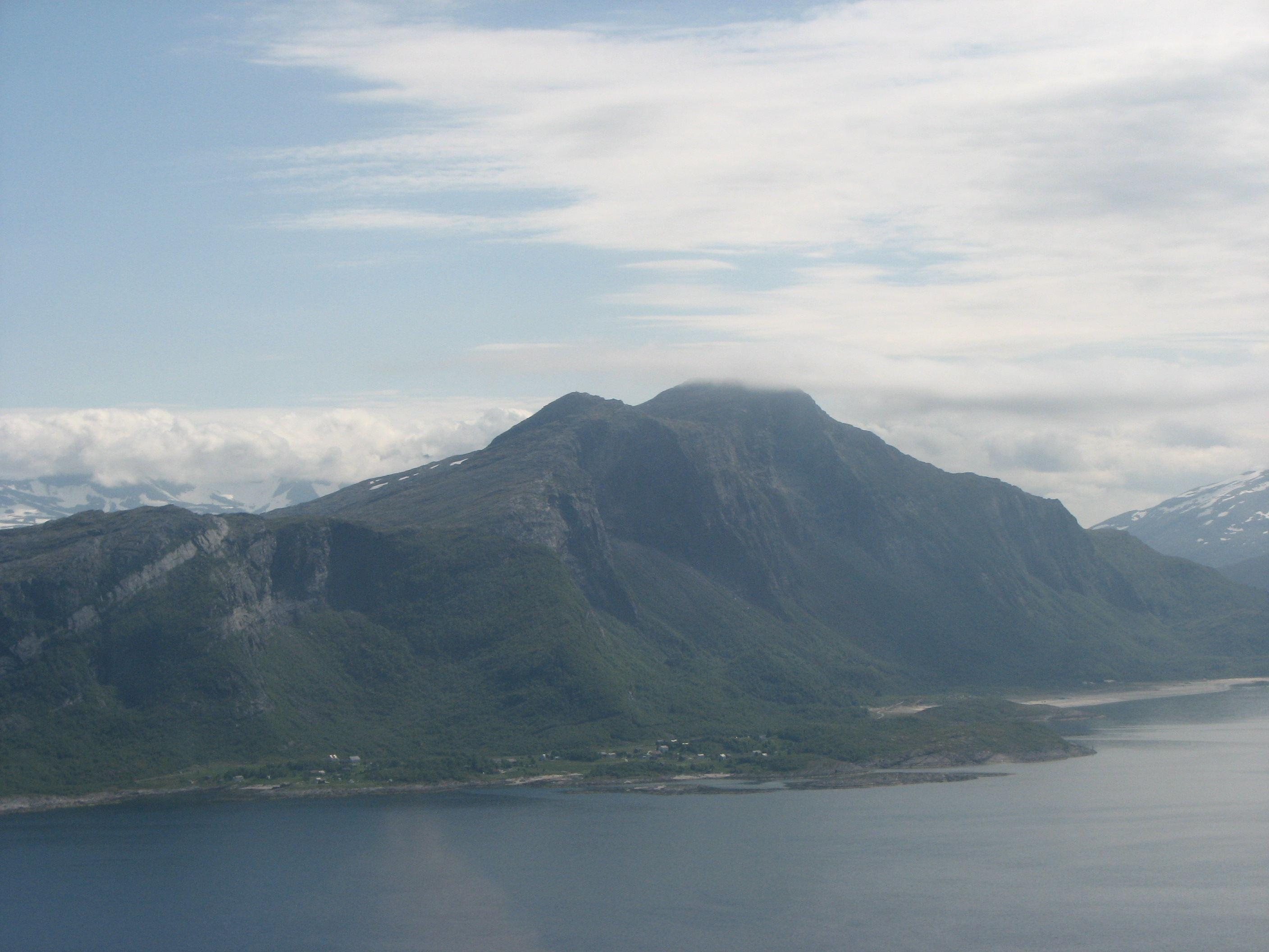 Sandhornet (994 moh.) Sandhornøya i Gildeskål